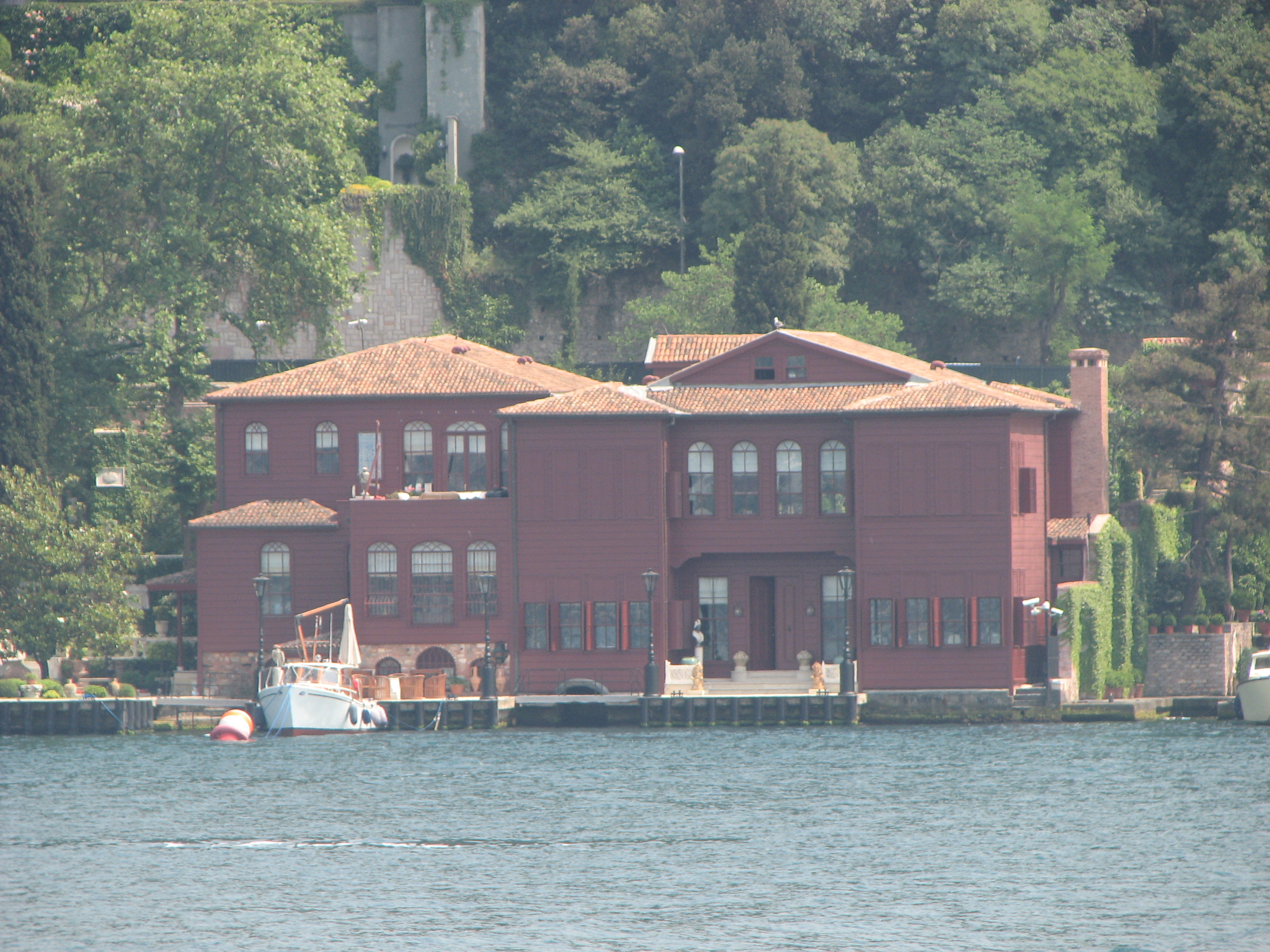 Kont Ostrorog yalısı ( Ostrorog House in Istanbul)